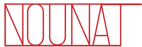 Premio Nounat